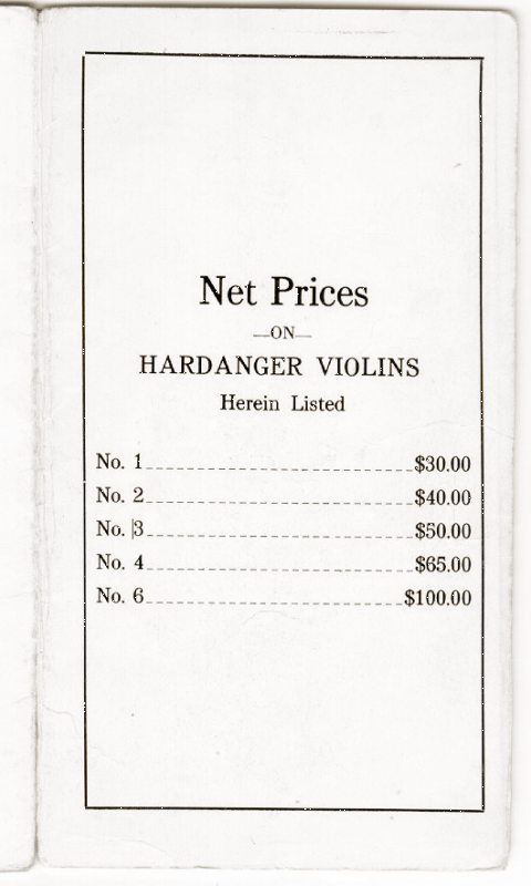 Eget arkivmateriale. Prisliste fra brosjyre for Helland Brothers.